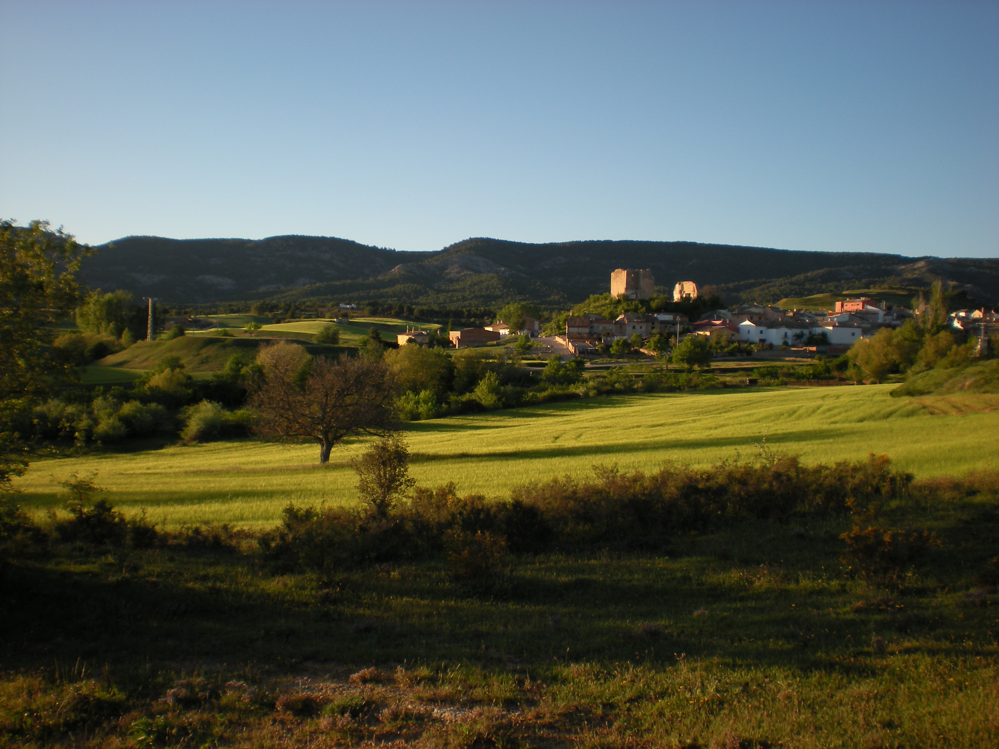 Vista de la localidad